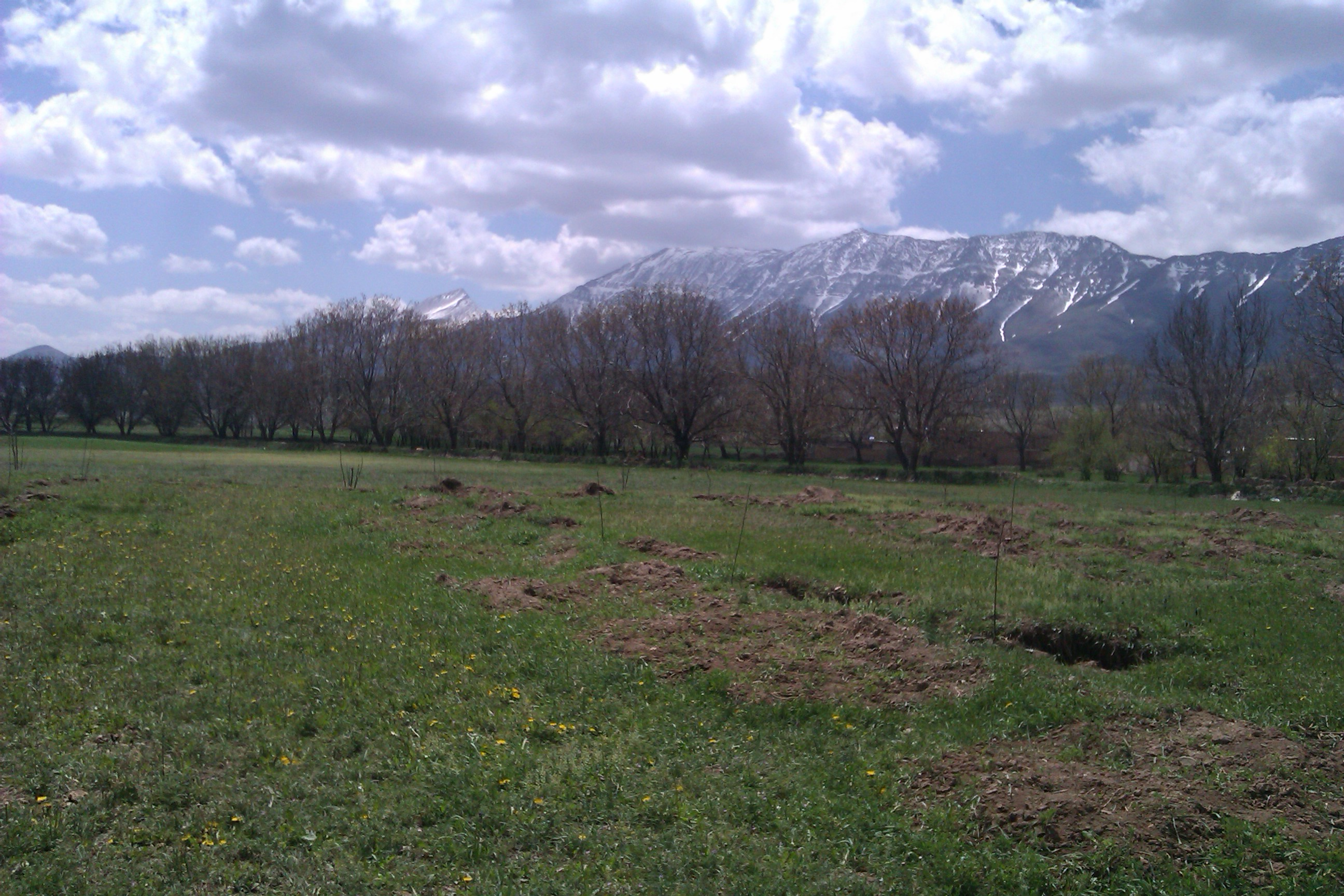 روستای ییلاقی فرج آباد